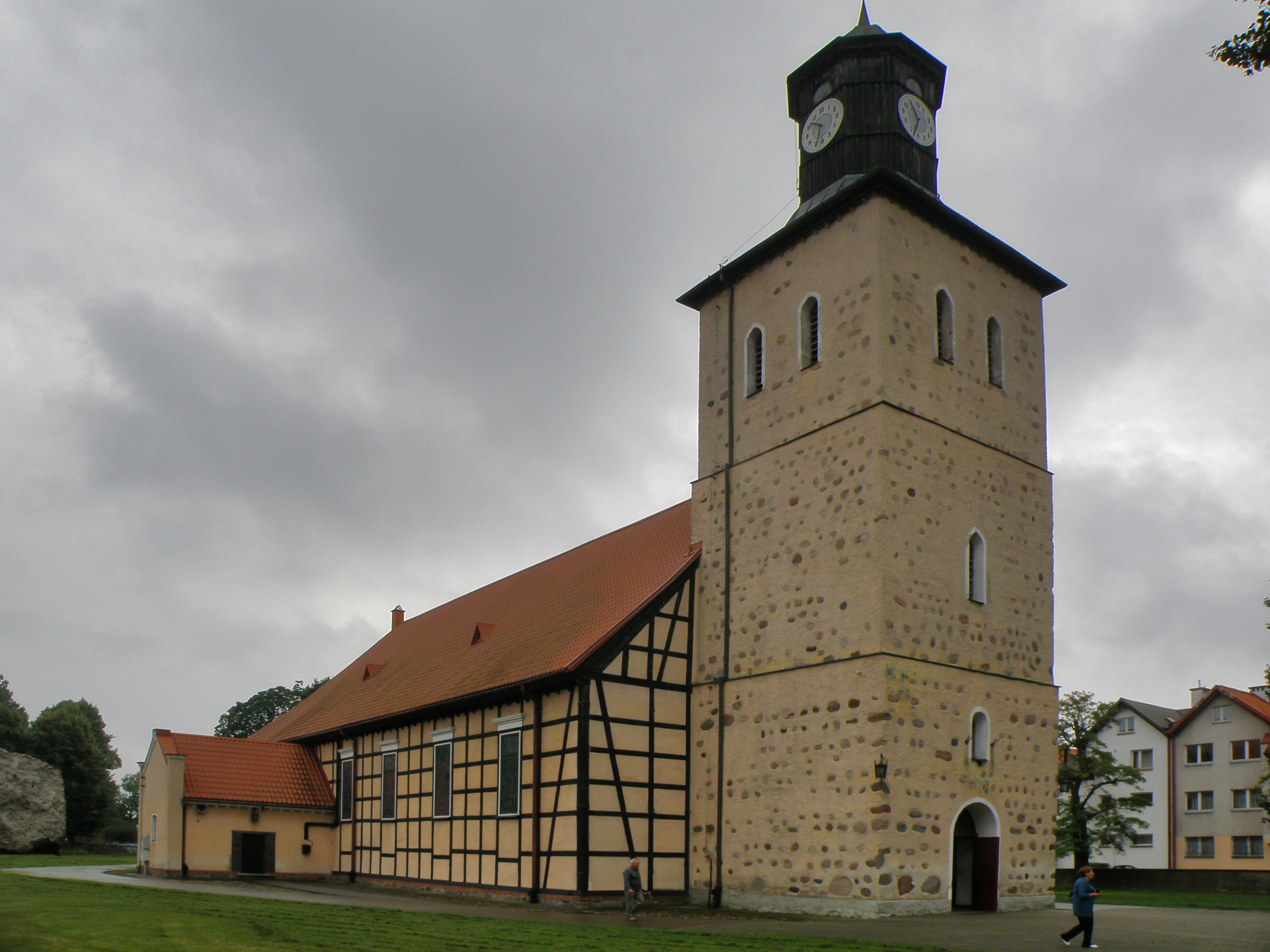 Polska, Pisz - Rzymskokatolicki Kościół Parafialny św. Jana Chrzciciela. Zabytek wpisany pod nr A-472 do rejestru zabytków województwa warmińsko-mazurskiego. This photo of Warmian-Masurian Voivodeship was taken during Wikiexpedition 2012 set up by Wikimedia Polska Association.You can see all photographs in category Wikiekspedycja 2012. The making of this document was supported by Wikimedia Polska.